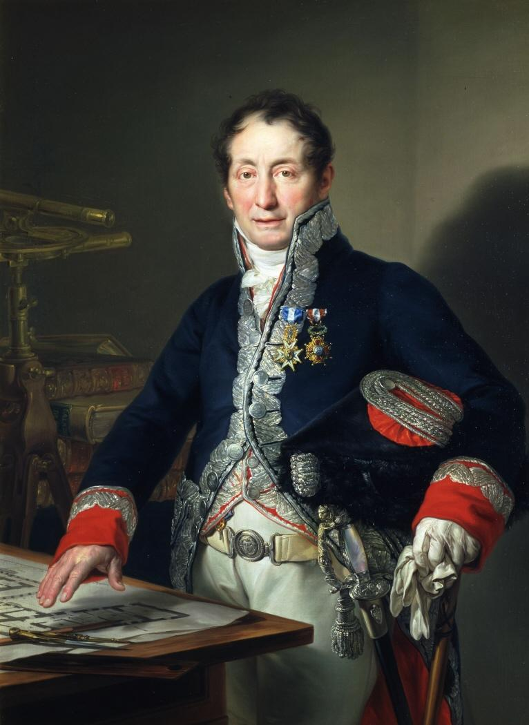 Retrato del arquitecto y pintor español Isidro González Velázquez (1765-1840), que era hijo del pintor Antonio González Velázquez y hermano del también pintor Zacarías González Velázquez.